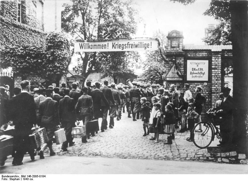 Kriegsfreiwillliger für die Pz.Gren.Div. "Großdeutschland" Die jungen Rekruten ziehen in langen Reihen in ihre Garnisonstadt ein. Bb. Stephan - A 130 262 Orbis E.M.